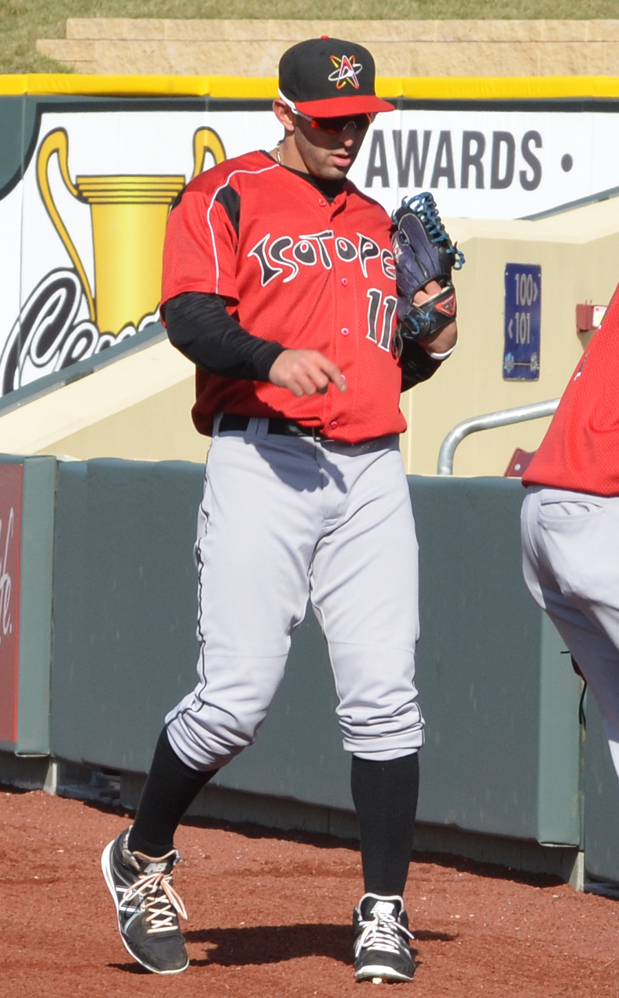 Alex Castellanos